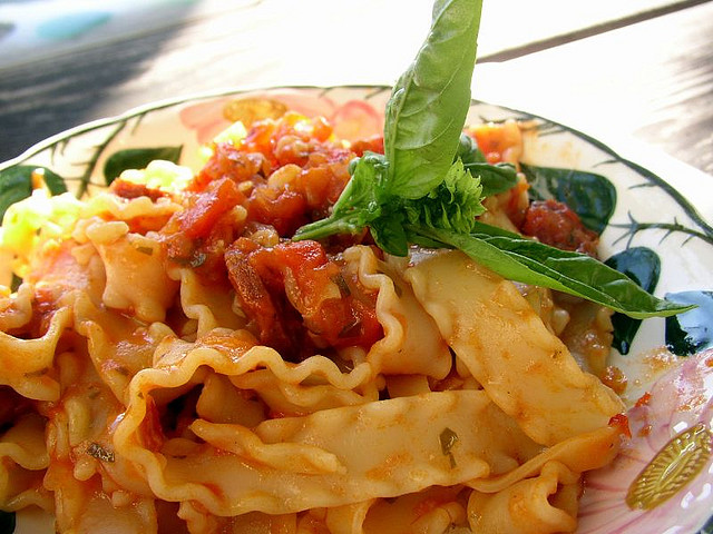 recipe